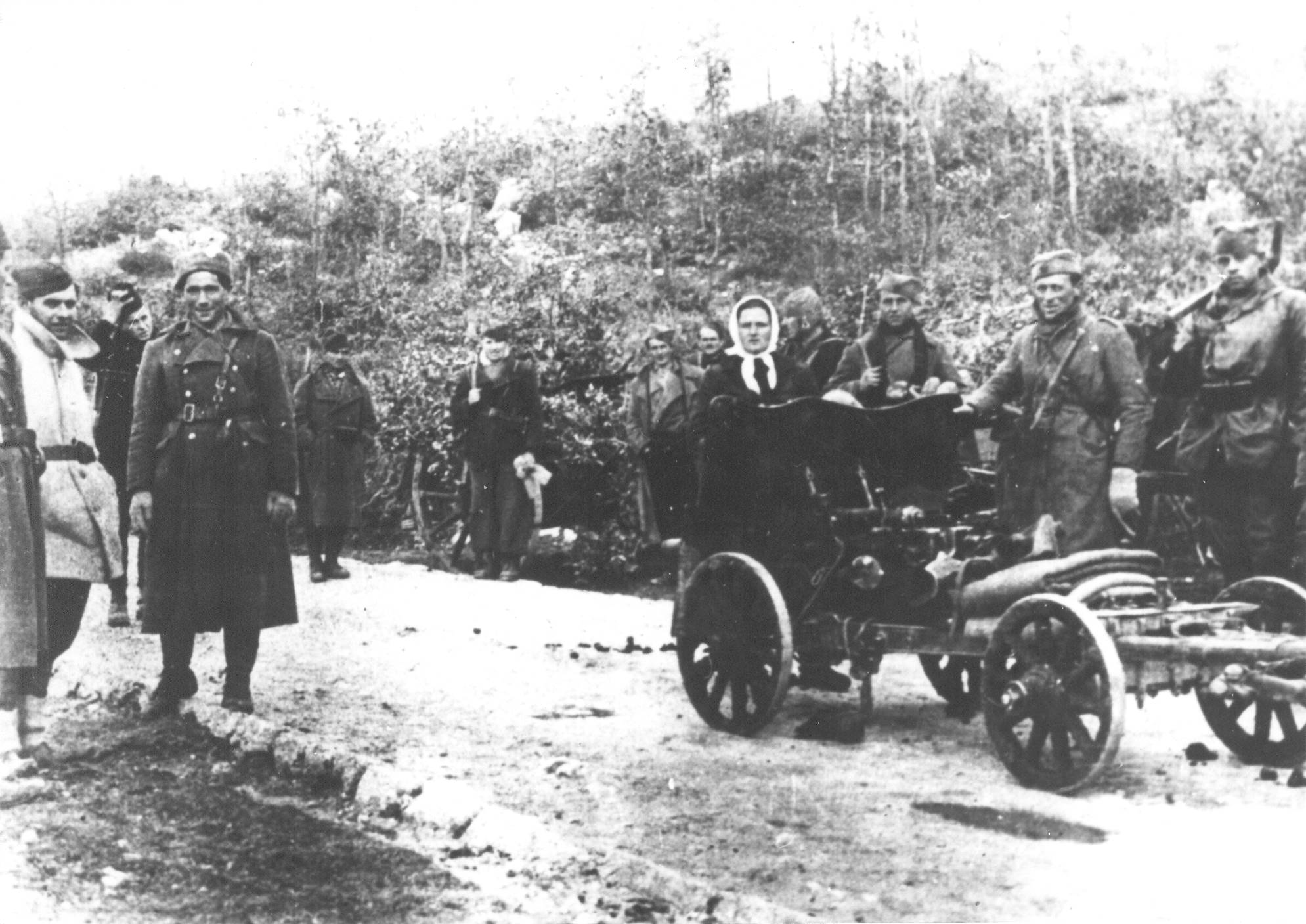 Srpskohrvatski / српскохрватски: Grupa boraca 2. proleterske brigade pored topa koji je dejstvovao na italijansku diviziju Murđe u dolini Rame 1943.